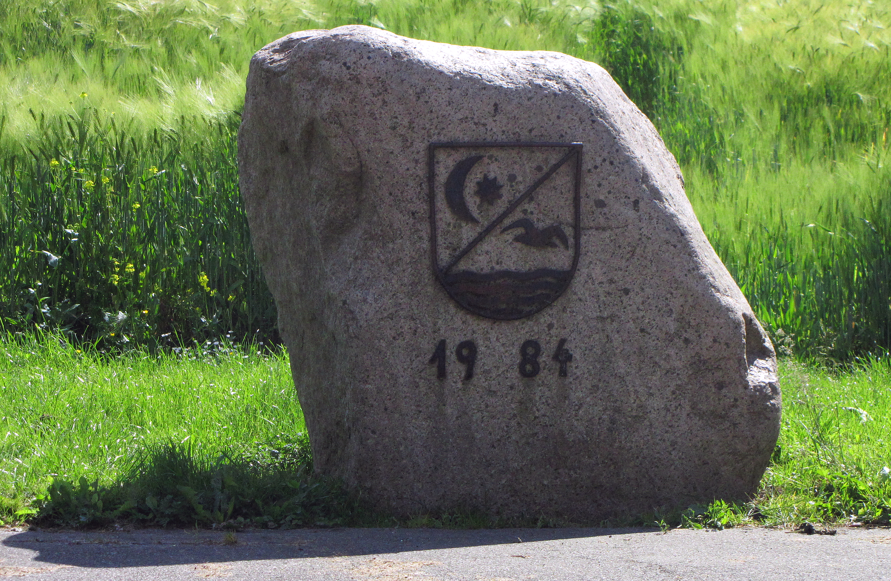 Steinberg (Ostsee): Wappen der Gemeinde Steinberg - Foto 2012 Wolfgang Pehlemann IMG_7464